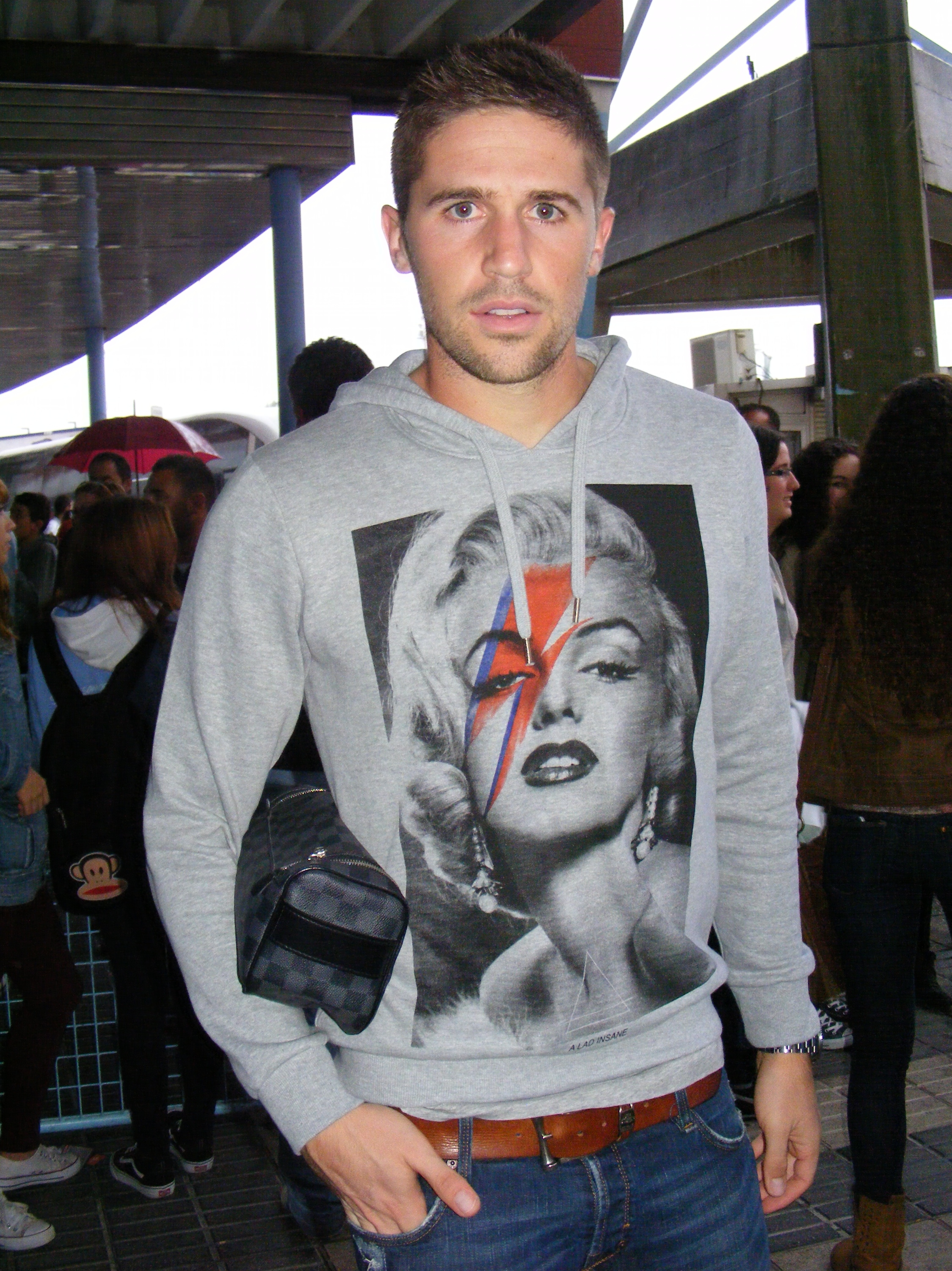 Andreu Fontàs después del partido Celta-Elche